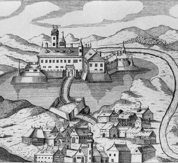 Sintava Castel